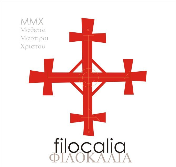 Filocalia es una agrupación musical católica, con reconocida participación en Argentina y Uruguay en eventos religiosos y juveniles. El estilo musical se basa en el folclore latinoamericano, el pop y el rock. Las letras incursionan en la espiritualidad y la oración, el compromiso cristiano con la sociedad, la defensa de la vida y la familia, la alegría de la fe y la musicalización de salmos y poesías de autores hispanoamericanos. Con una estética sencilla y un compromiso misionero que es parte integral de la propuesta de la banda, ha recorrido numerosos escenarios y lugares, tales como teatros, campos deportivos, plazas, festivales callejeros, cárceles, villas miseria (“favelas”), peregrinaciones a santuarios marianos, Misas, etc. Actualmente ha incorporado, a sus presentaciones, diferentes videos que ilustran las letras de las canciones, y subtítulos en inglés para las canciones más importantes. La temática en el presente espectáculo musical y audiovisual gira en torno a la defensa de la vida, desde la concepción hasta la muerte natural, así como canciones-homenaje a grandes testigos como Juan Pablo II y la Madre Teresa de Calcuta, canciones de adoración, alabanza, etc. Filocalia desde 1997, busca aportar valores a la cultura contemporánea desde el cristianismo, intentando encarnar el sentido que da, a su nombre, el inciso 2727 del Catecismo de la Iglesia Católica: “amor de la Belleza absoluta”. Hemos participado en la reciente JMJ Madrid 2011, en el marco del festival Anuncio, con el concierto “Abraza la Vida”, y en el encuentro de la Acción Católica Internacional.